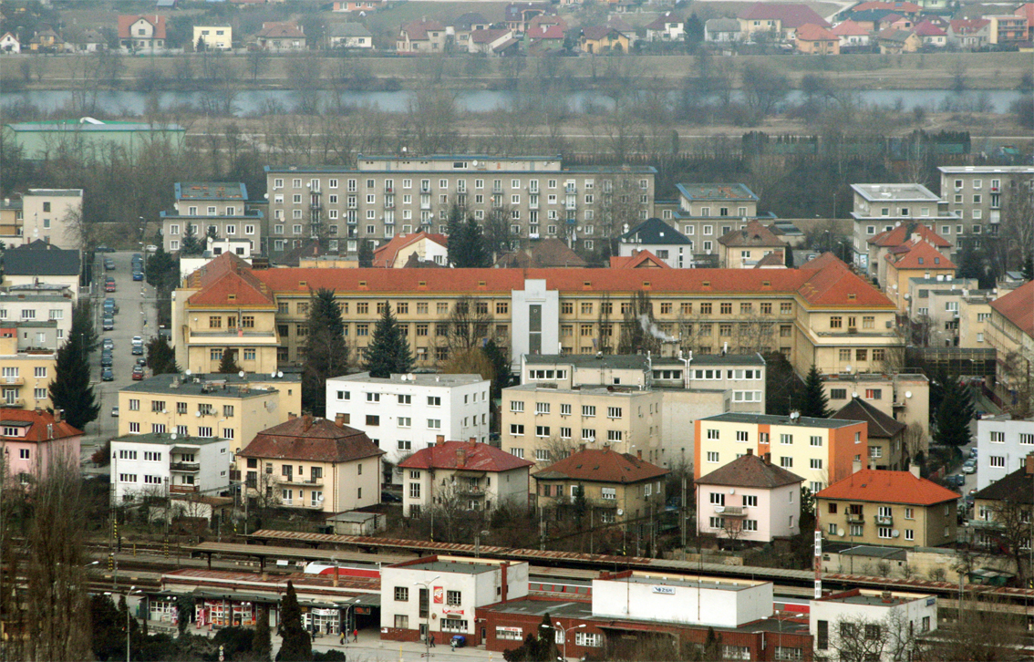 Železničná stanica v Trenčíne